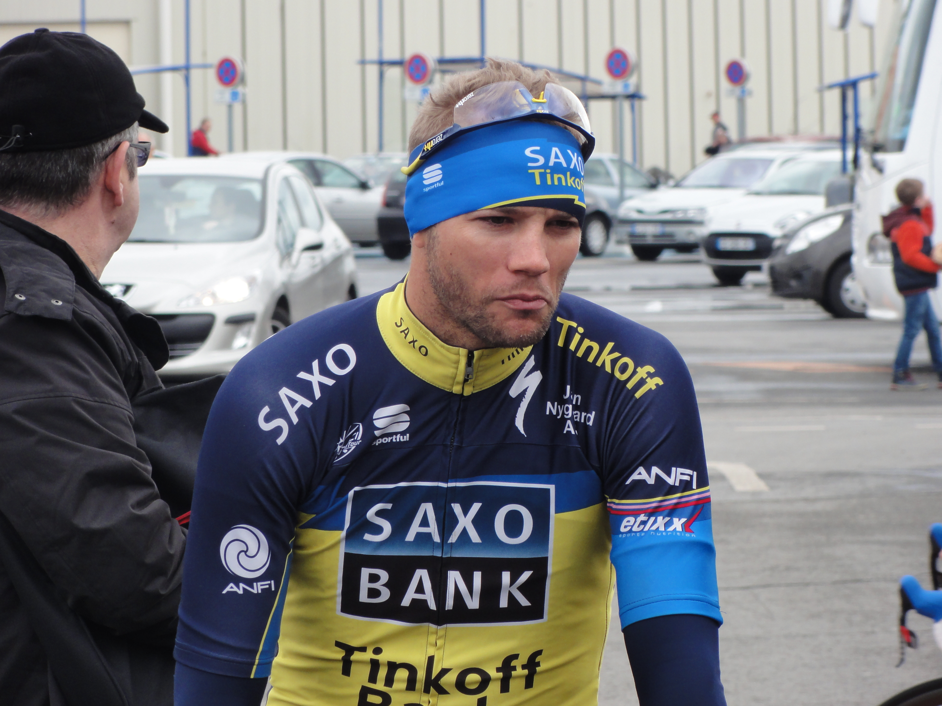 Reportage photographique réalisé le mardi 11 avril 2013 durant l'édition 2013 du Grand Prix de Denain à Denain, Nord, Nord-Pas-de-Calais, France. Depicted person: Jonathan Cantwell